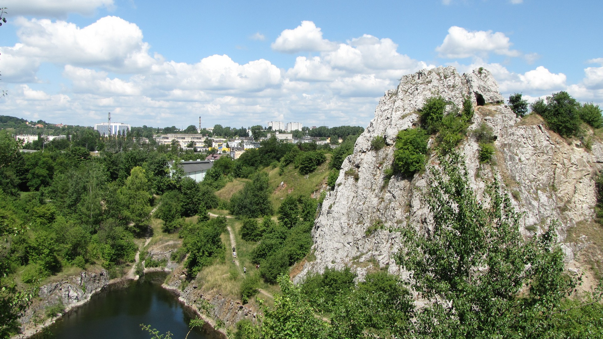 Kadzielnia - Skałka Geologów i Jezioro Szmaragdowe